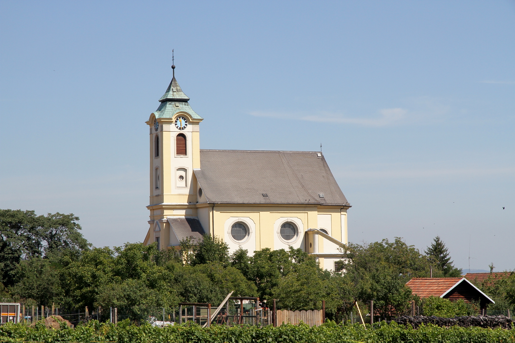 Die kath. Pfarrkirche Hll. Dreifaltigkeit, Simon und Judas in der burgenländischen Marktgemeinde Oggau am Neusiedler See.